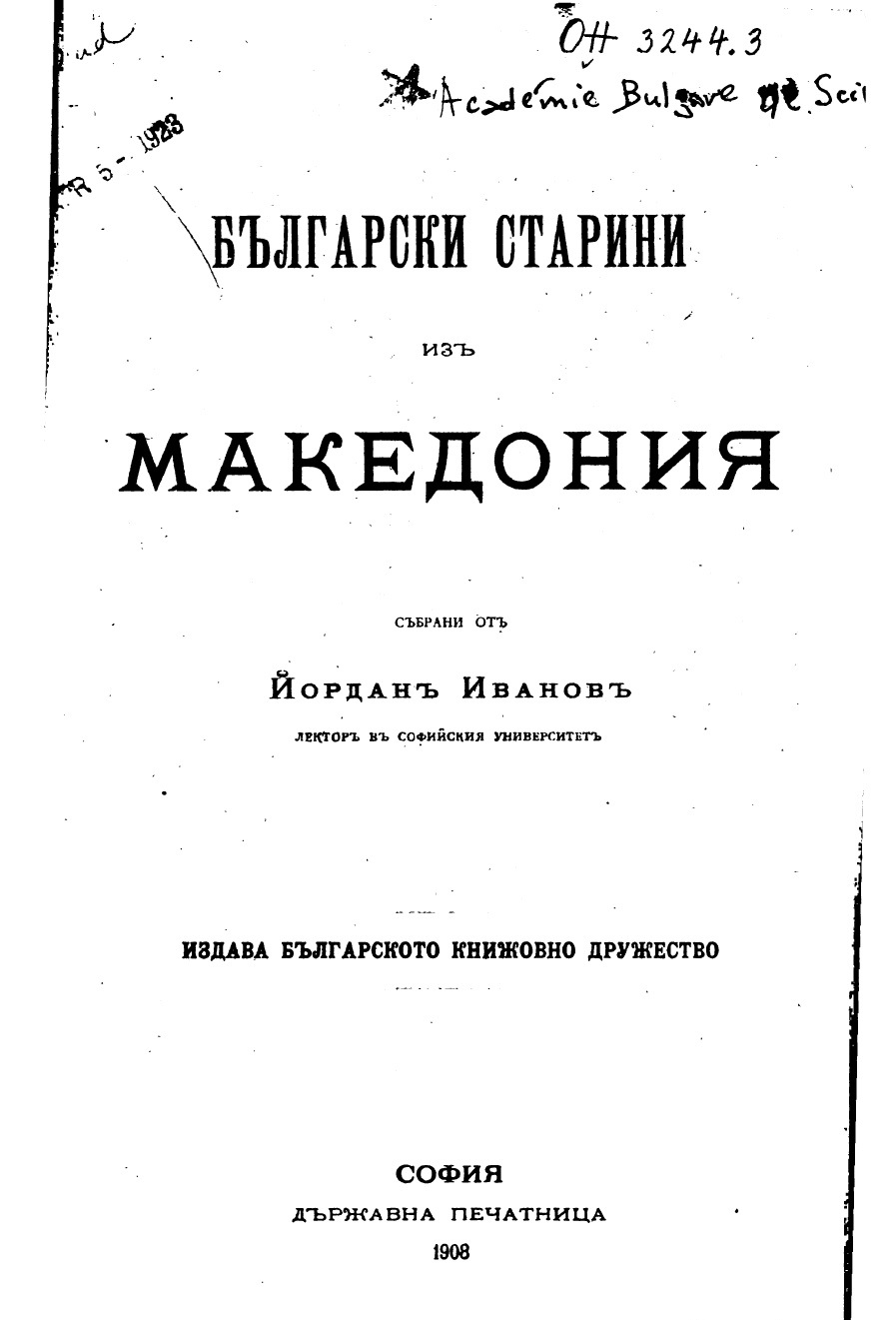 Български старини из Македония